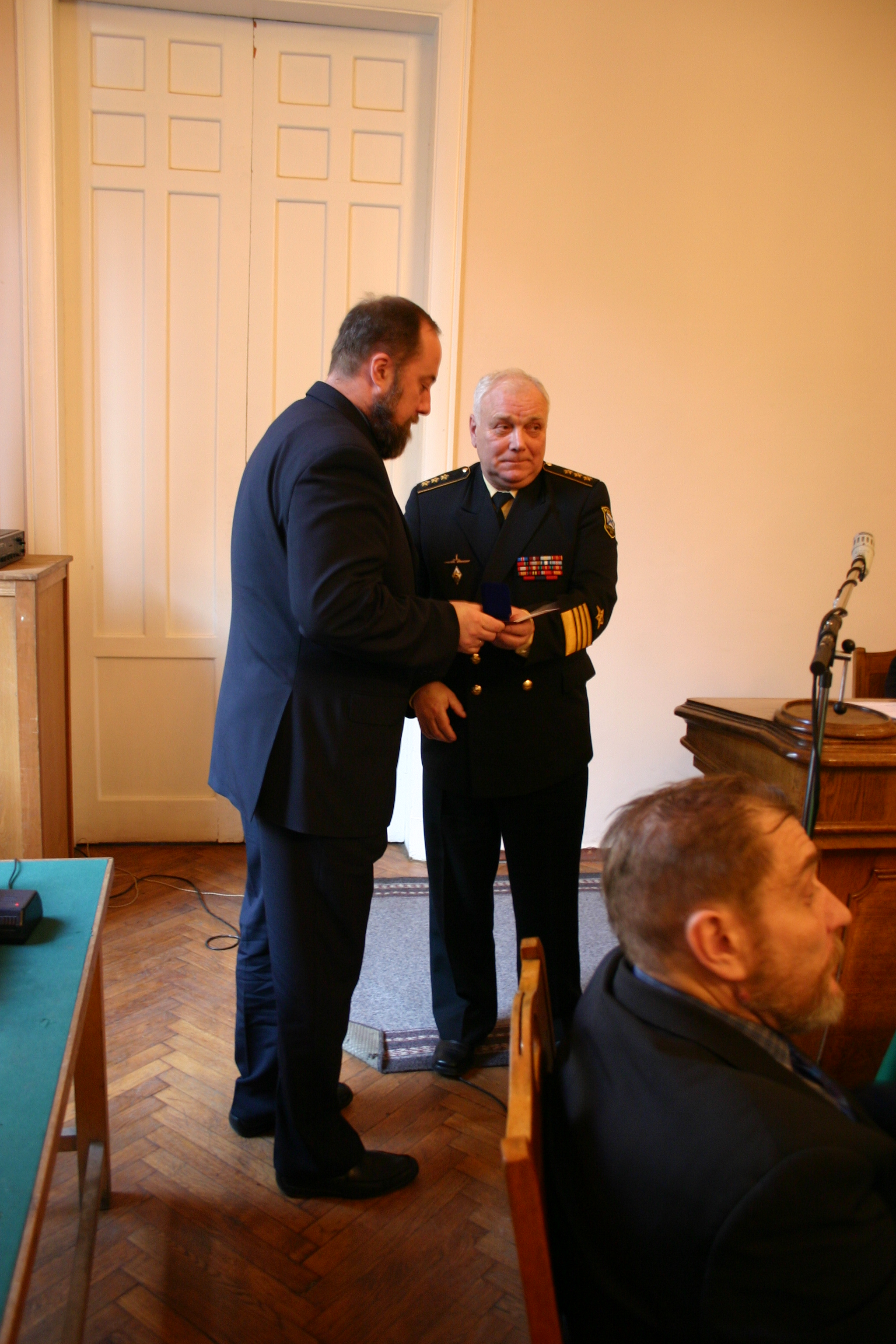 Адмирал Комарицын вручает награду РГО медаль "За заслуги" Леониду Колотило. Ноябрь 2005 года.